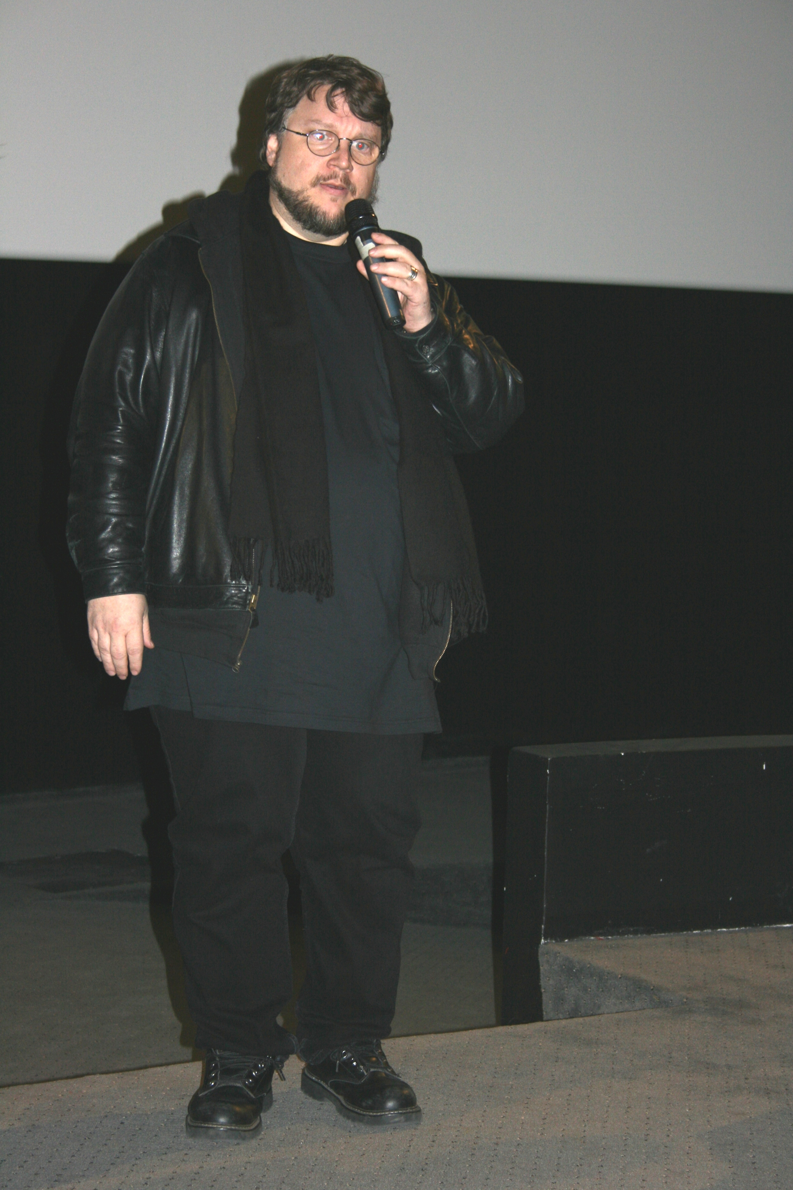 Guillermo del Toro à l'avant-première de L'Orphelinat diffusée à l'UGC Ciné Cité Les Halles, à Paris.